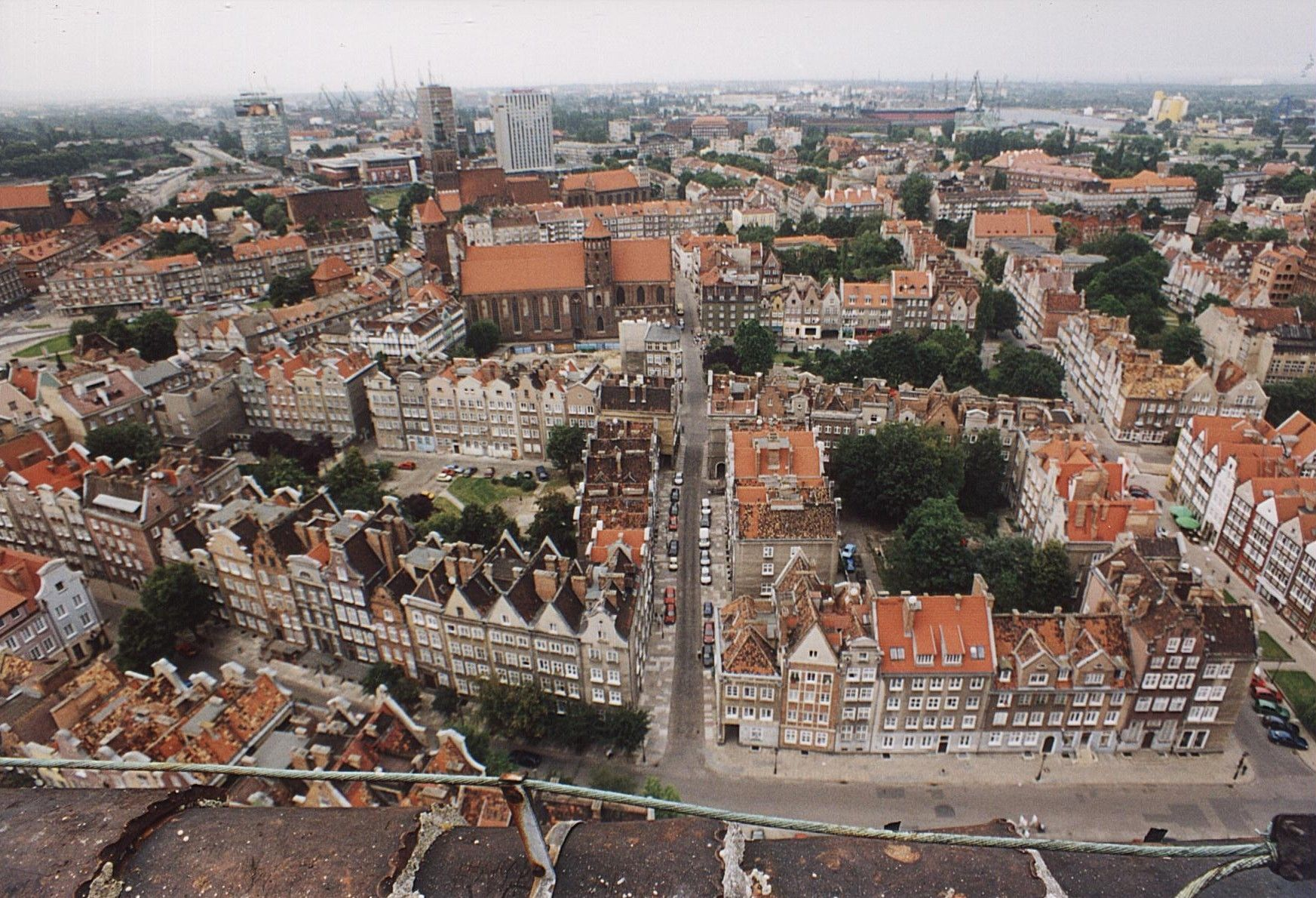 układ urbanistyczny miasta Gdańska w obrębie nowożytnych fortyfikacji (zabytek nr 15)